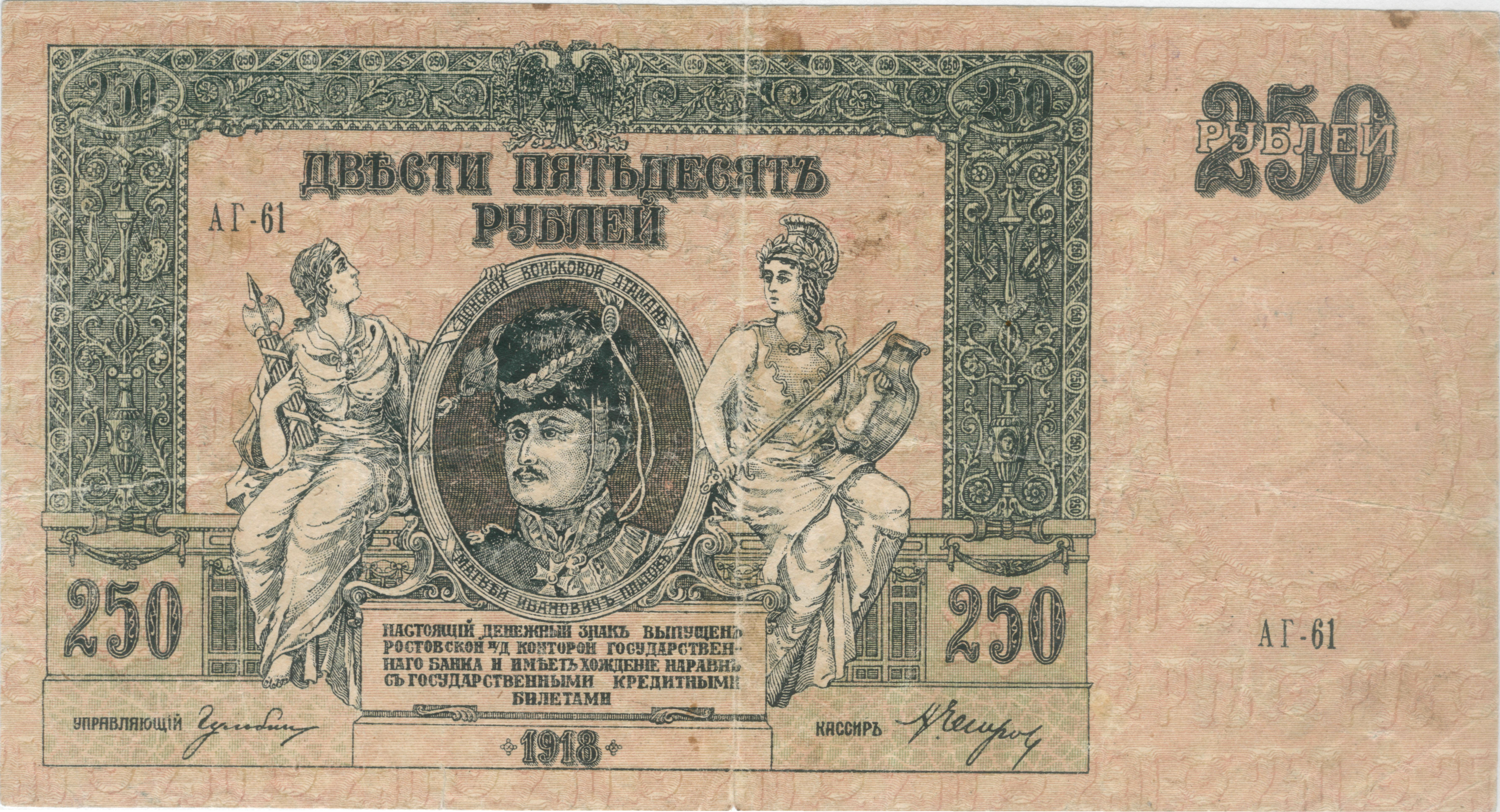 Донские деньги 250 рублей. Атаман Платов. Аверс. 1918. Ростов-н-Дону